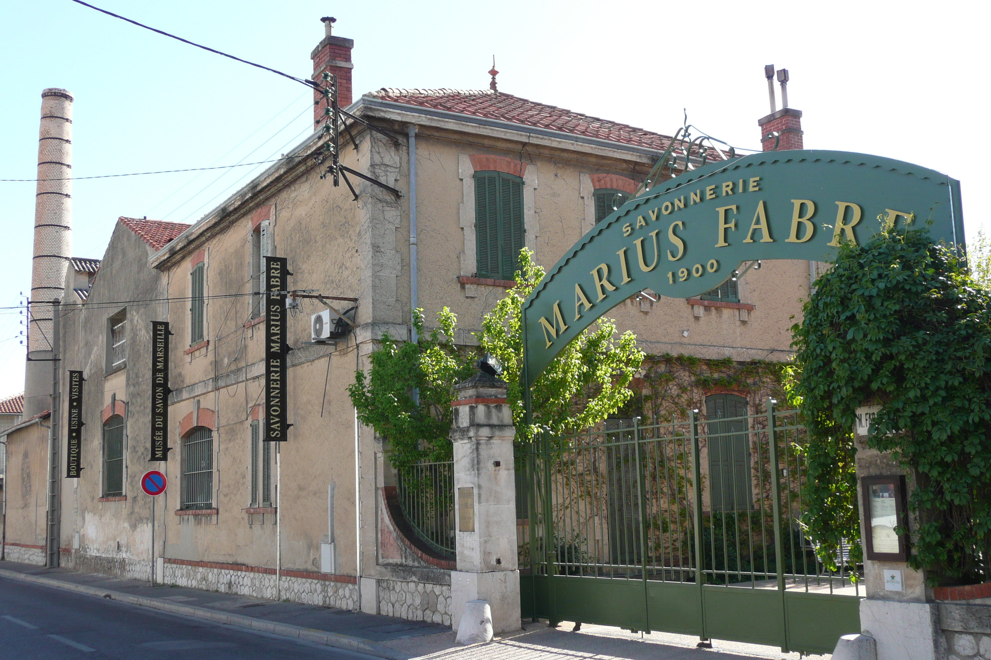 Savonnerie à Salon-de-Provence.